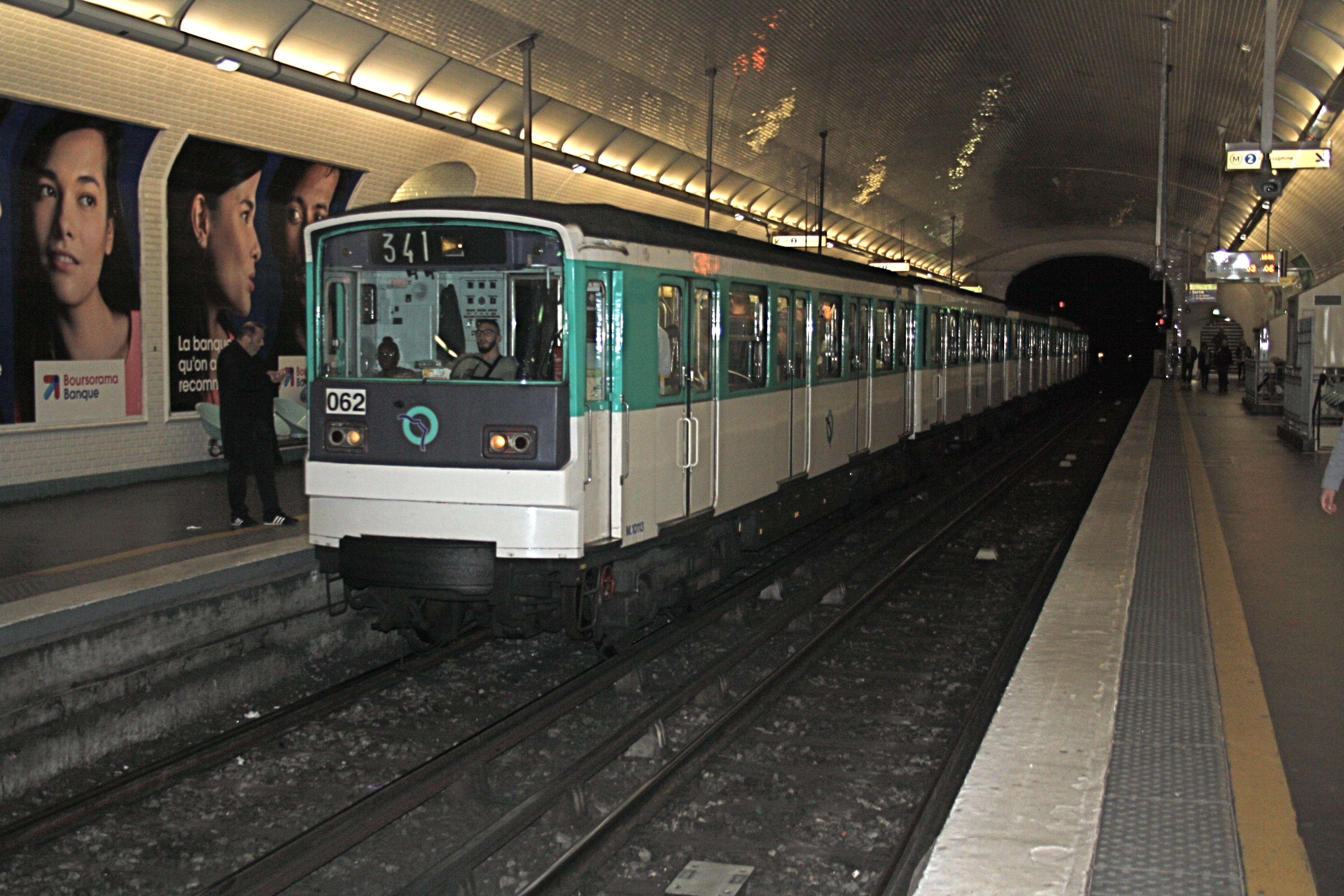 MF 67 in der Pariser Métrostation Villiers der Linie 3